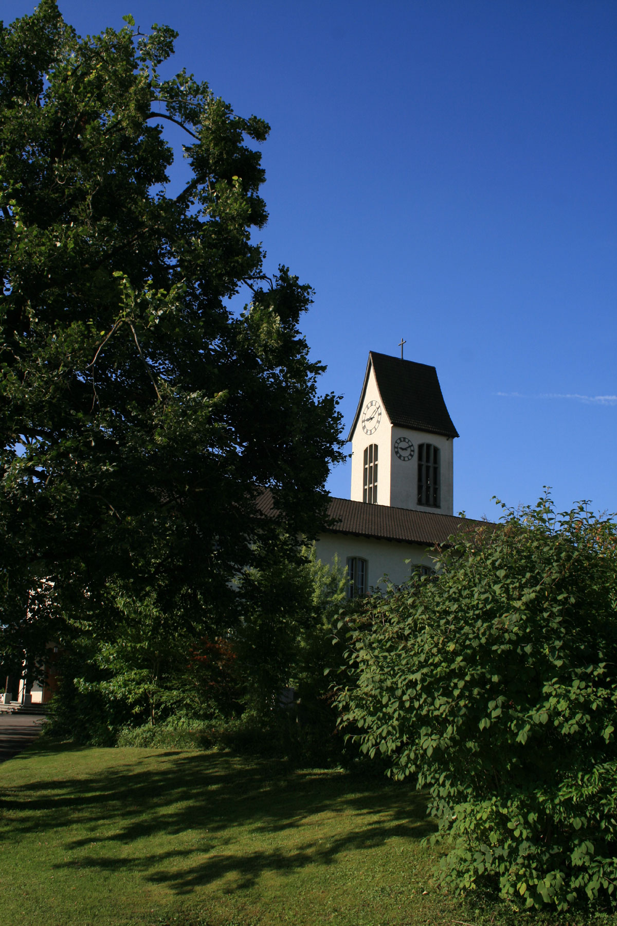 Aristau röm.-kath. Kirche